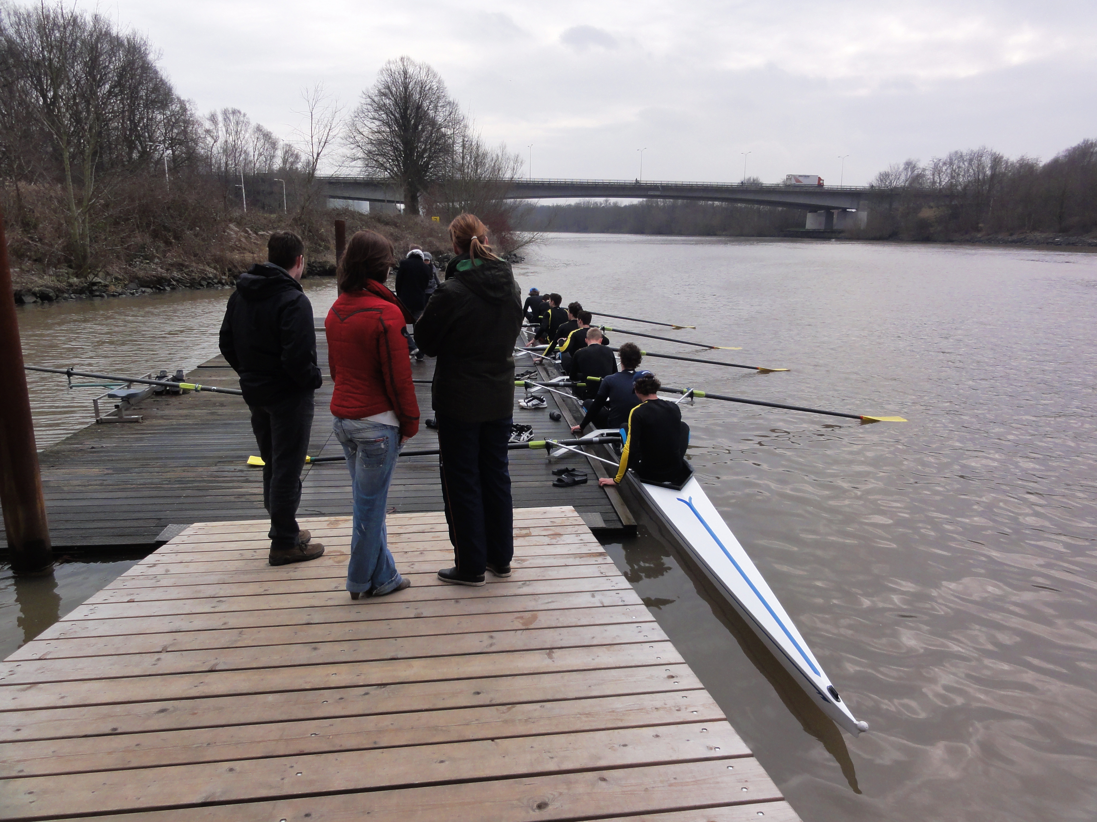 Nijmegen, roeiers-acht bij aanlegvlonder botenhuis Phocas op Maas-Waalkanaal, op de achtergrond de Hatertse brug